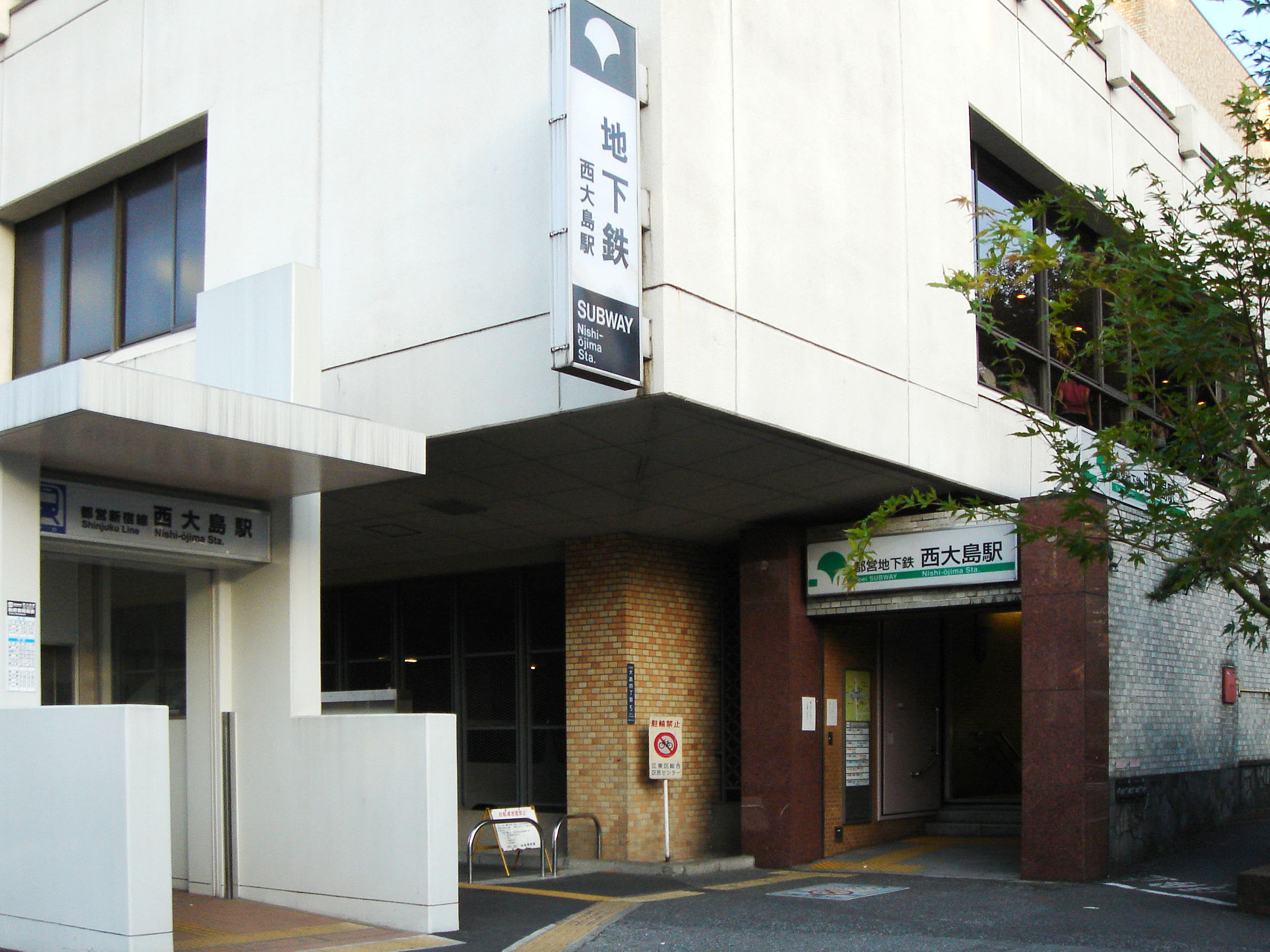 Nishi-ojima subway station, TOKYO, JAPAN